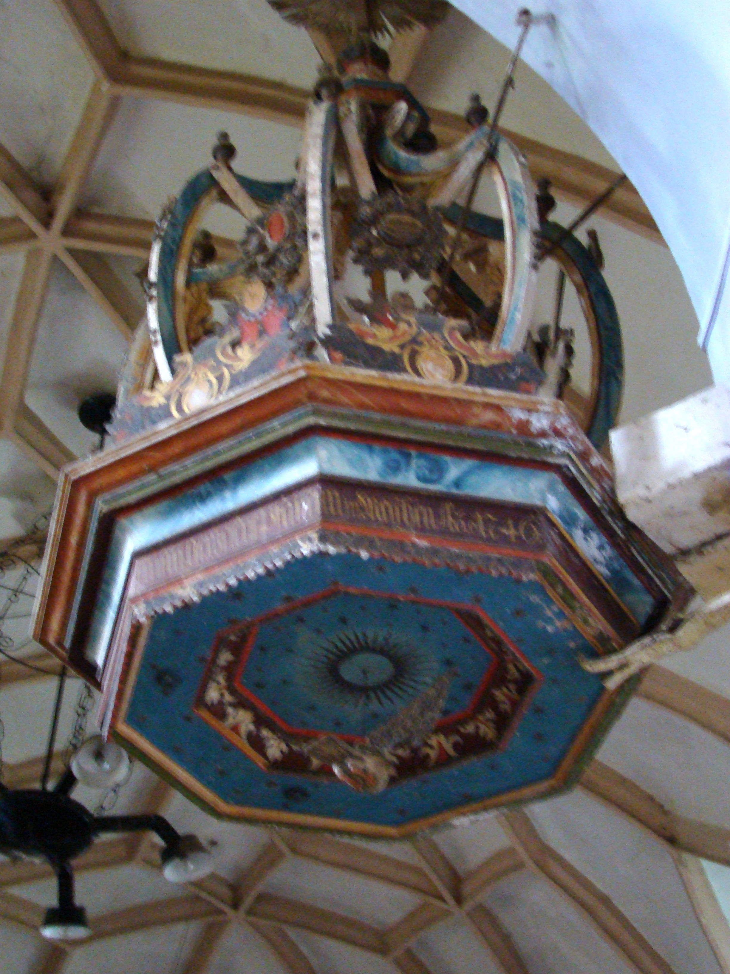 Biserica evanghelică fortificată din Valea Viilor, județul Sibiu 01